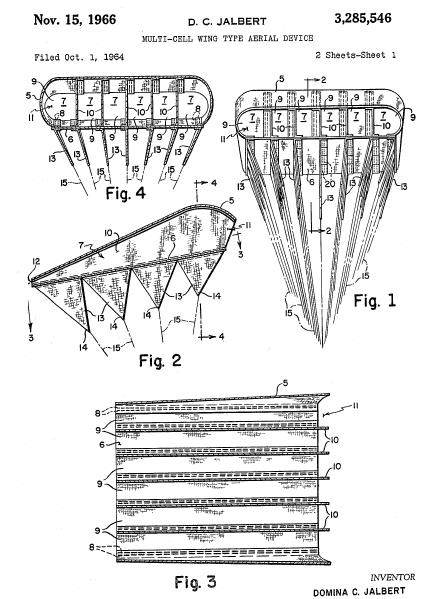 Zeichnungen des von JALBERT entwickelten "Matratzenschirms" (Multi-Cell-Wing) aus der Patentschrift US-Patent 3,285,546 vom 15.11.1966.